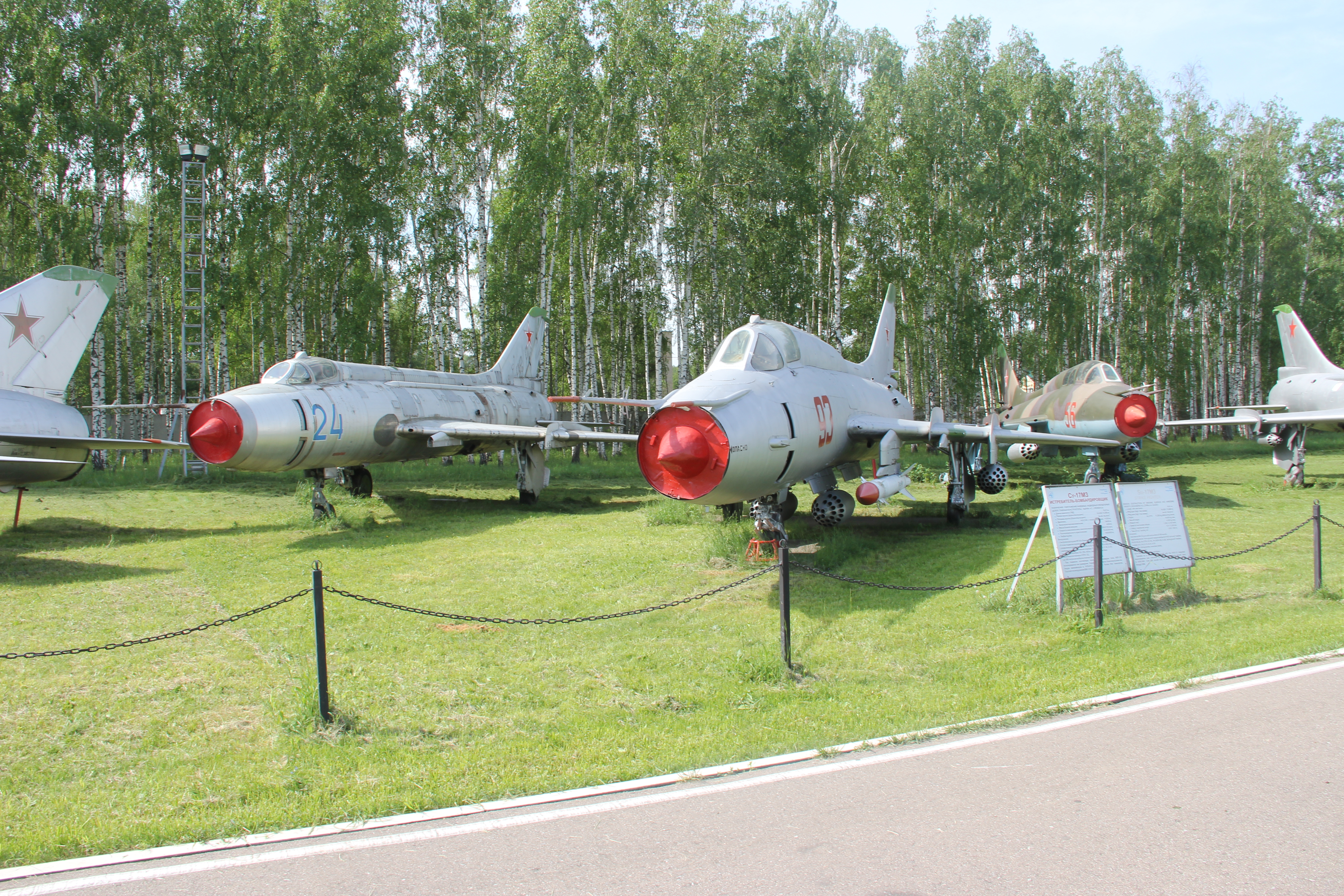 Sukhoi Su-17s at Monino